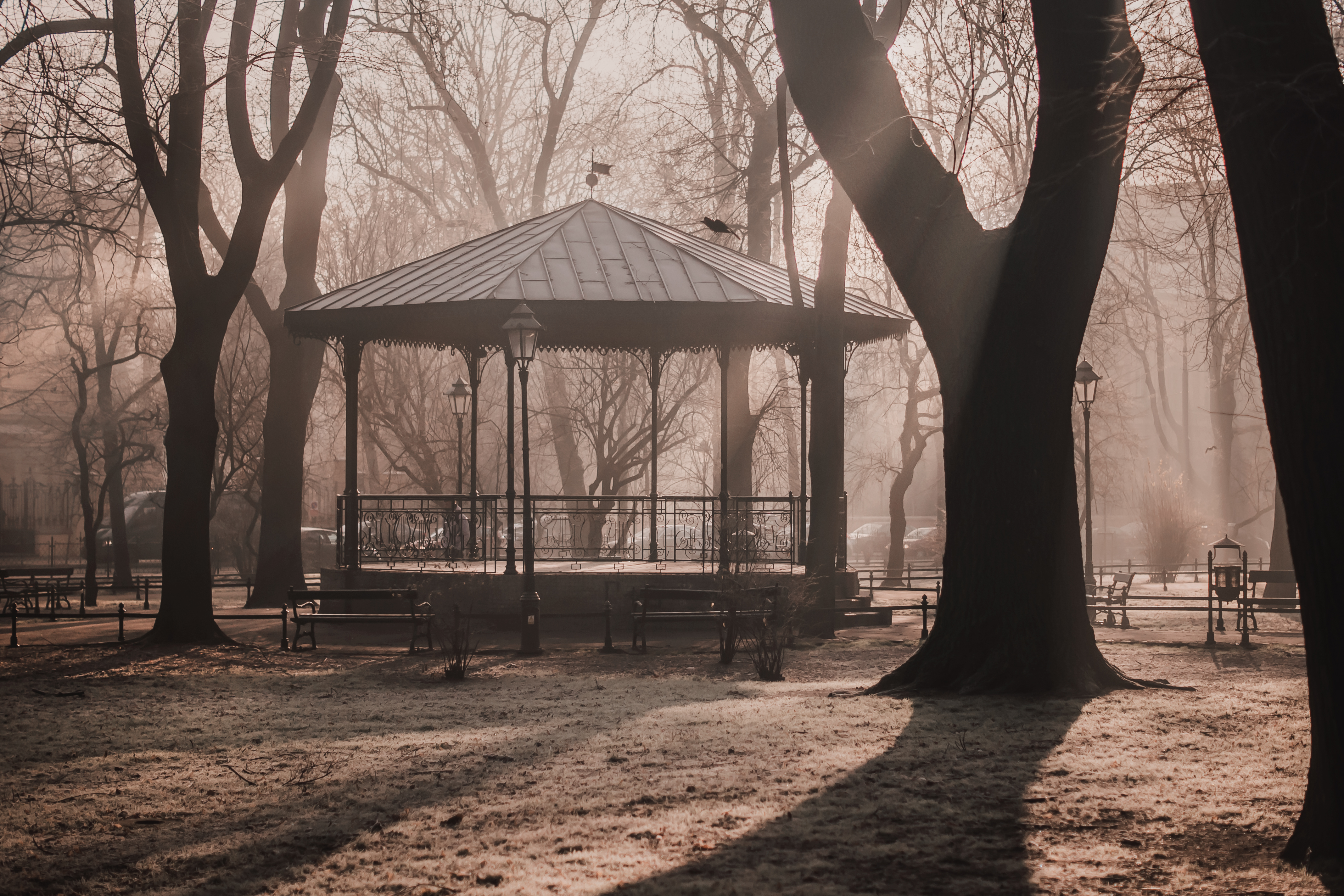 Kraków, Planty krakowskie